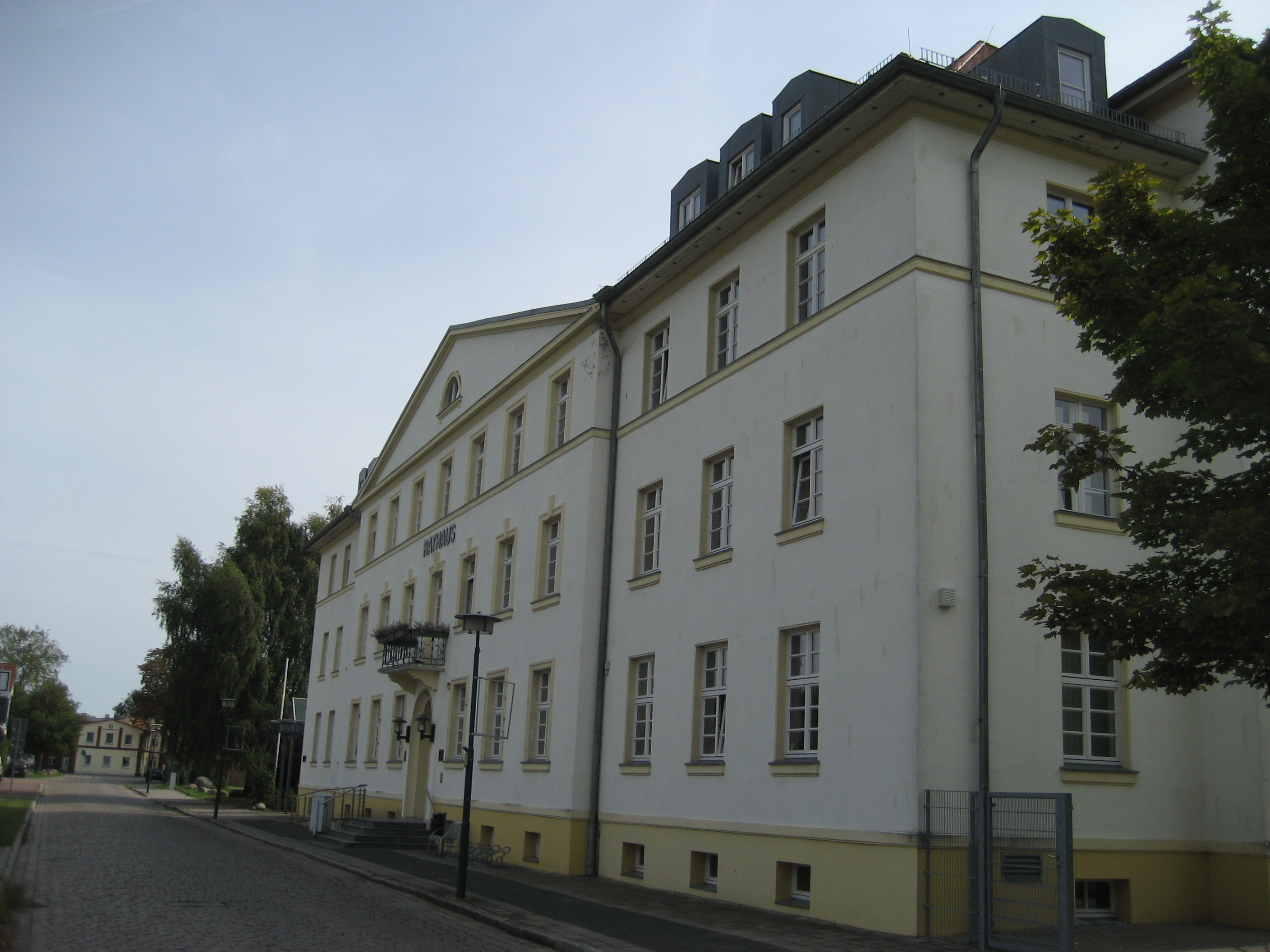 Das Rathaus von Pasewalk in der Haußmannstraße 85. Ursprünglich 1928 als Finanzamt von Pasewalk erbaut, seit der Zerstörung des Alten Rathauses am Marktplatz 1945 jedoch als Sitz der Stadtverwaltung genutzt.